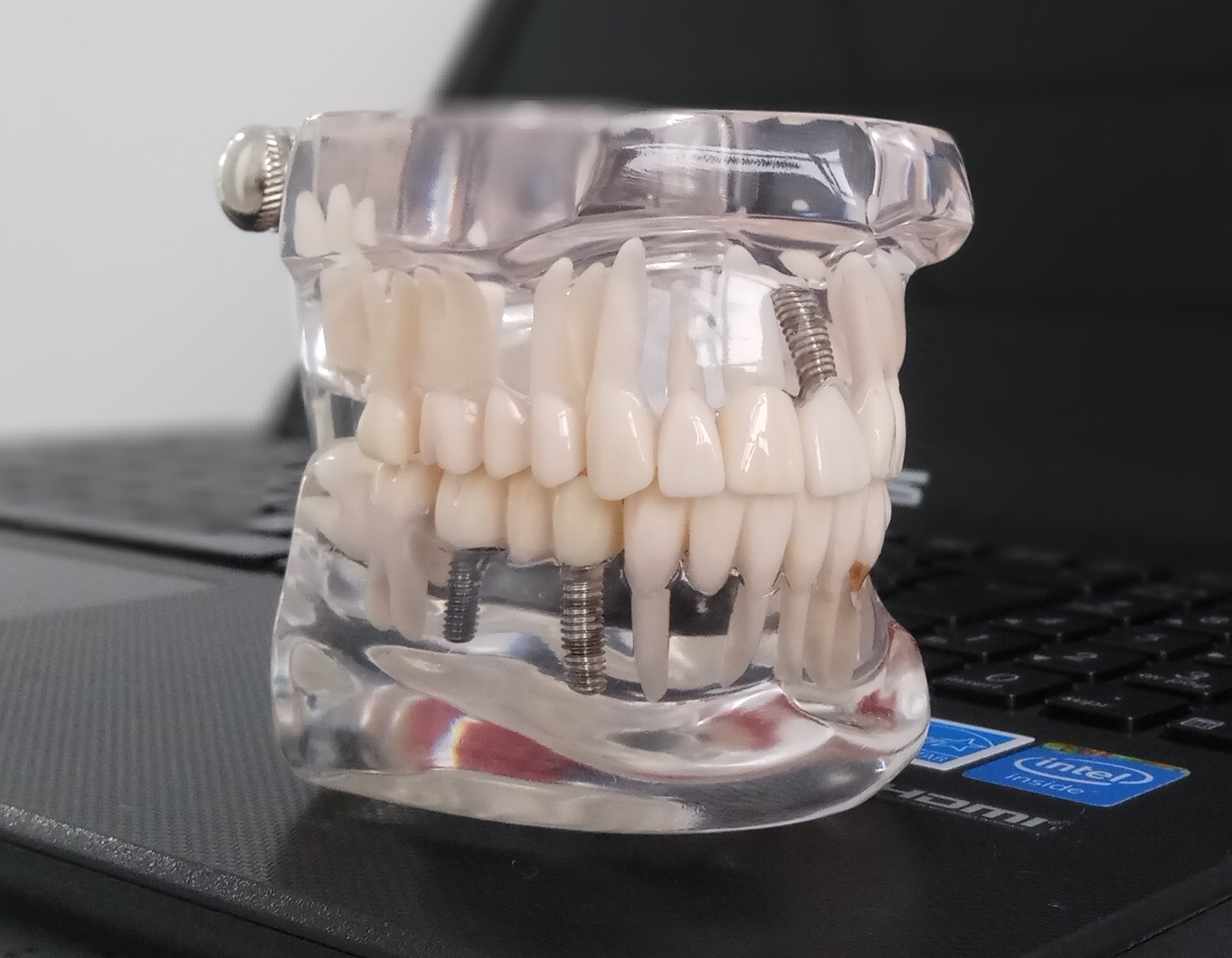 Esta es una imagen de un implante dental en coruña hecha en la Clínica Cuidadent